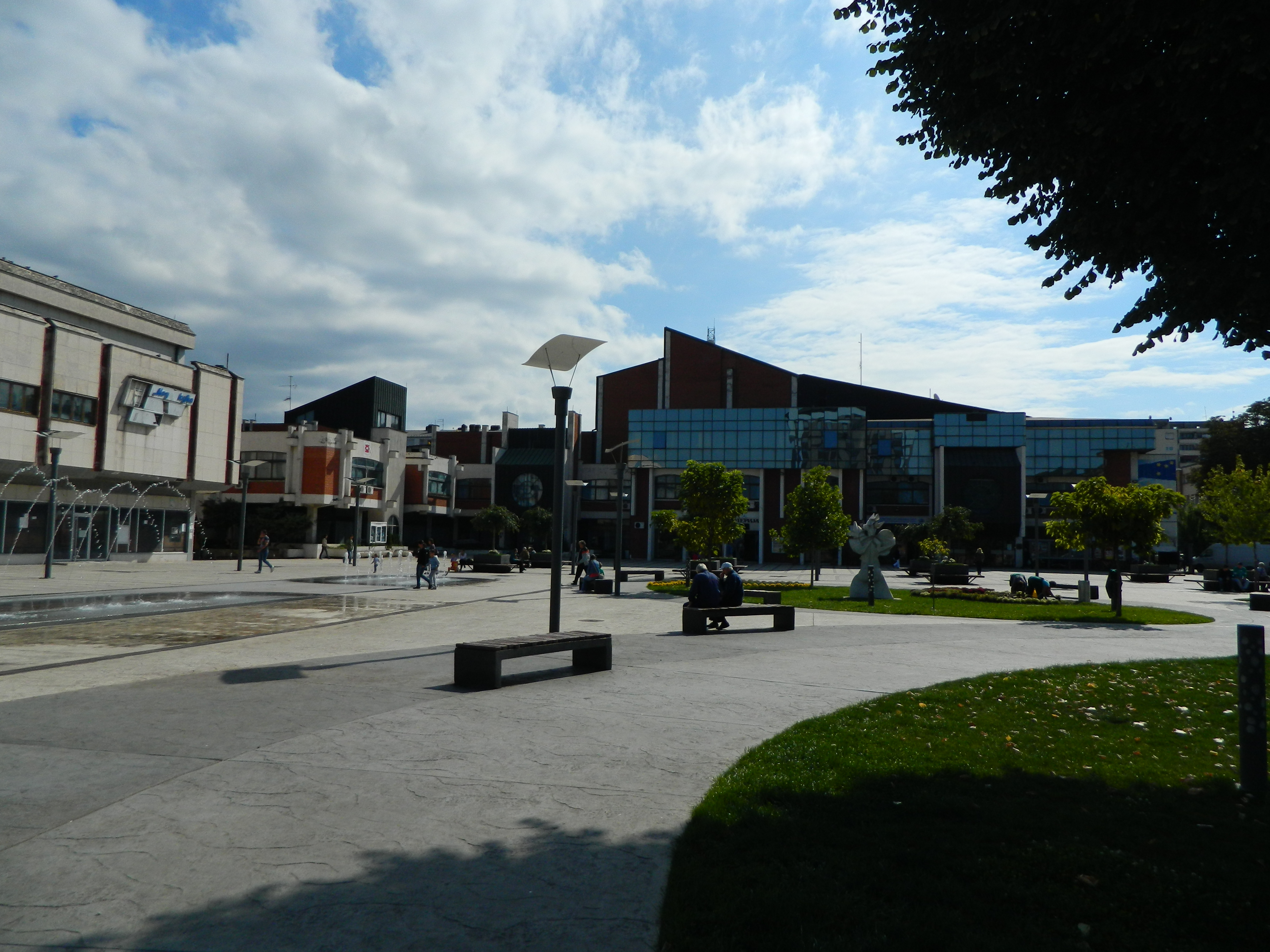 Centar Pirota